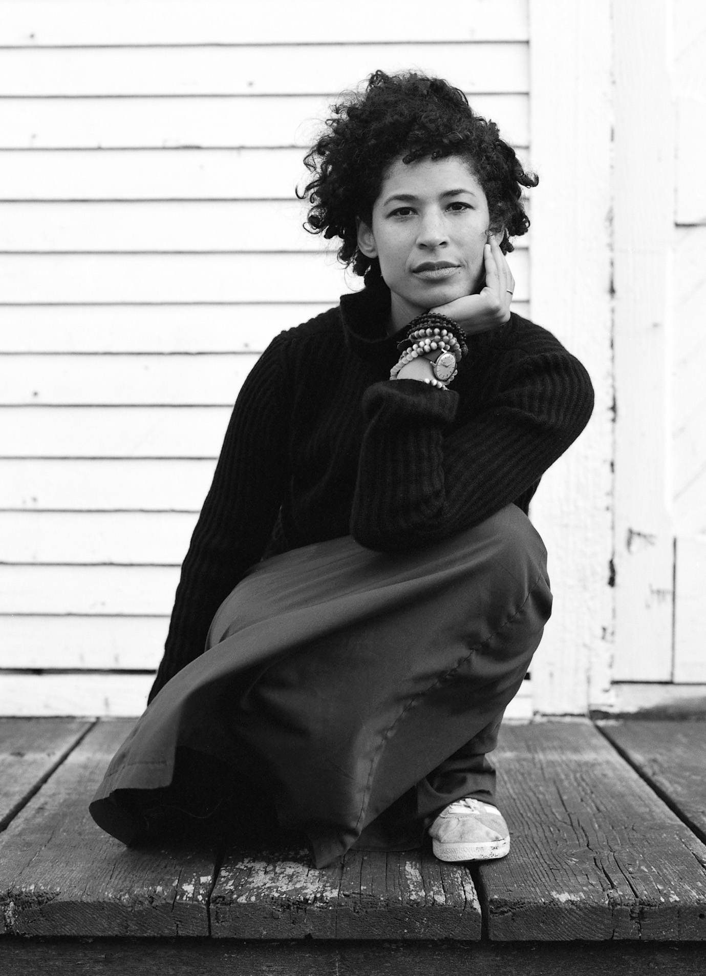 portret van Rebecca Walker